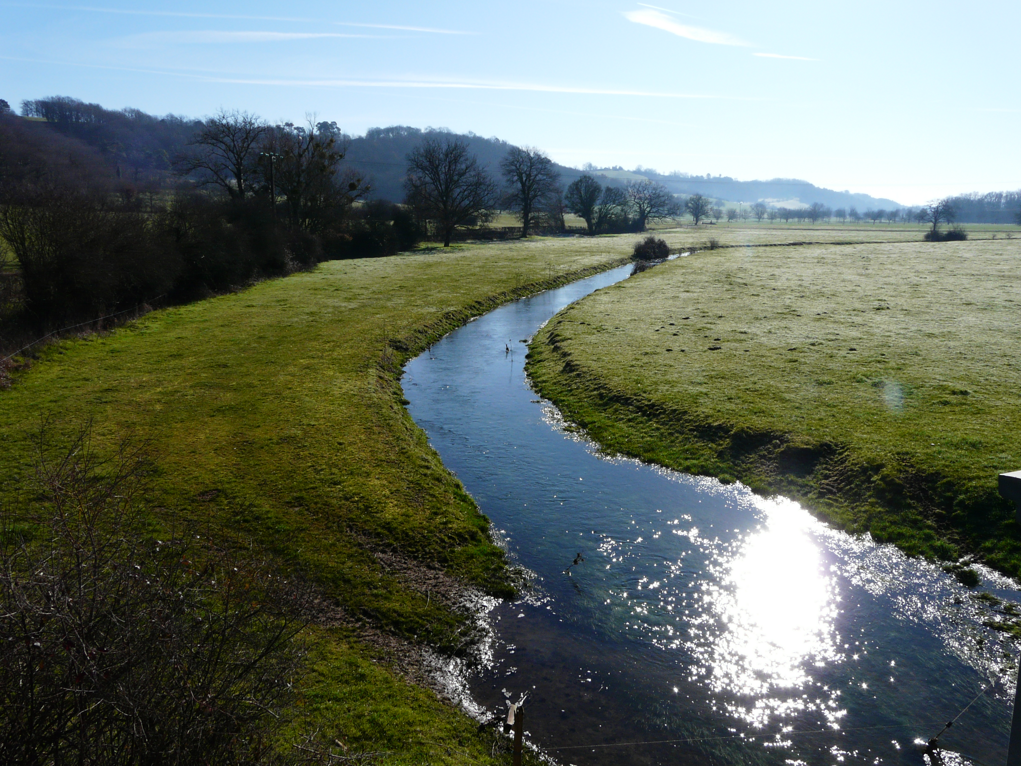 Le Vern au Pont de Bordas, en amont de la route nationale 21, Grun-Bordas, Dordogne, France.